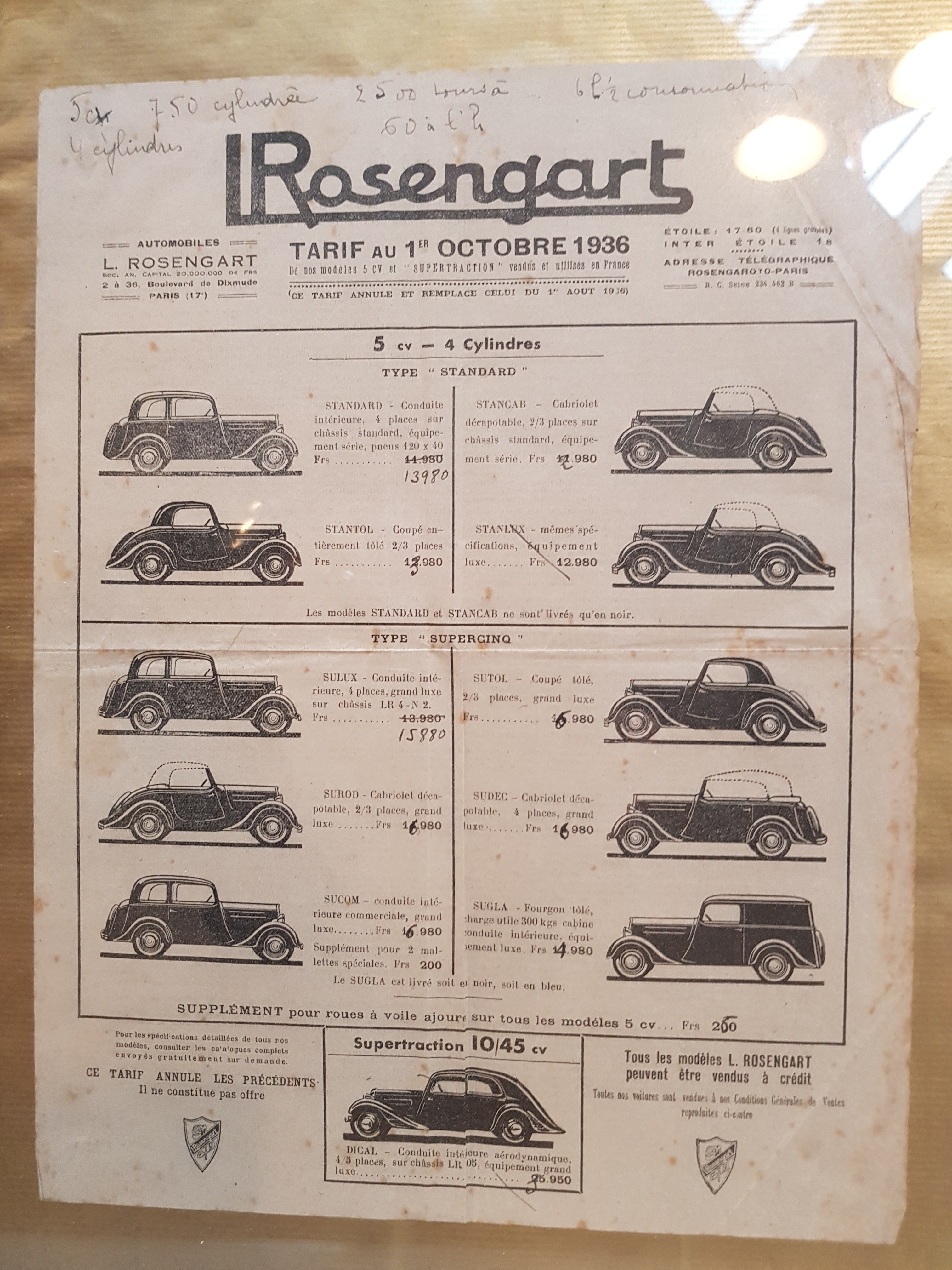 Carré Rosengart, anciennes usines de la marque, à Saint-Brieuc (Port du Légué)